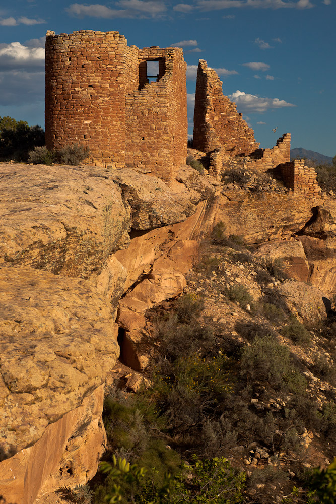 Hovenweep National Monument